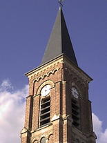 Eglise Saint-Vaast de Féchain